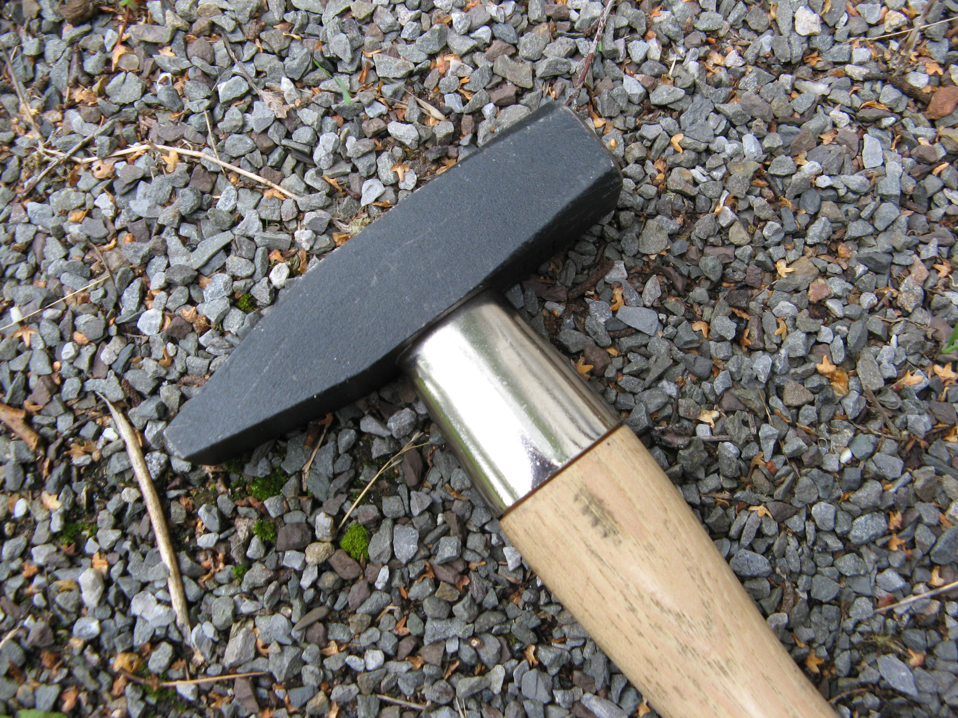 Schlosserhammer 400